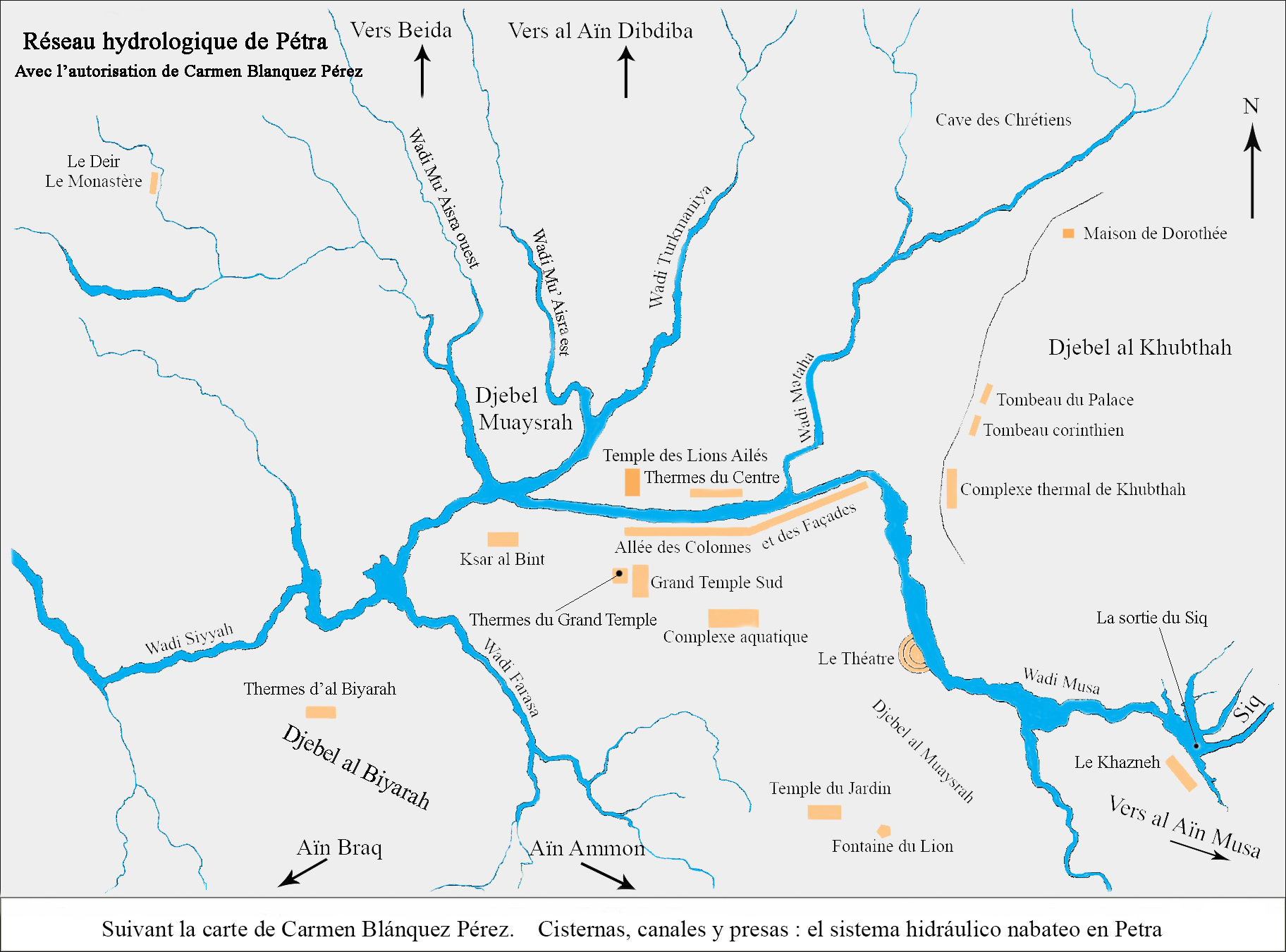 Carte hydrologique des environs de Pétra. D’après le plan de Carmen Blánquez Pérez. et avec l'autorisation écrite de Carmen Blánquez Pérez le 29 04 2019.